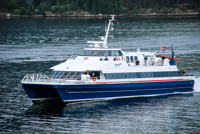 MS Fjordprins i Balestrand i 2009